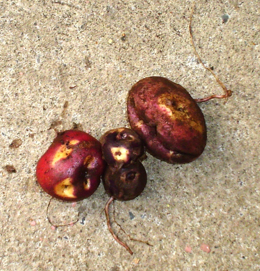 Tubérculos de papas (Solanum tuberosum subsp. tuberosum) de la variedad cabrita, originaria de Chiloé.